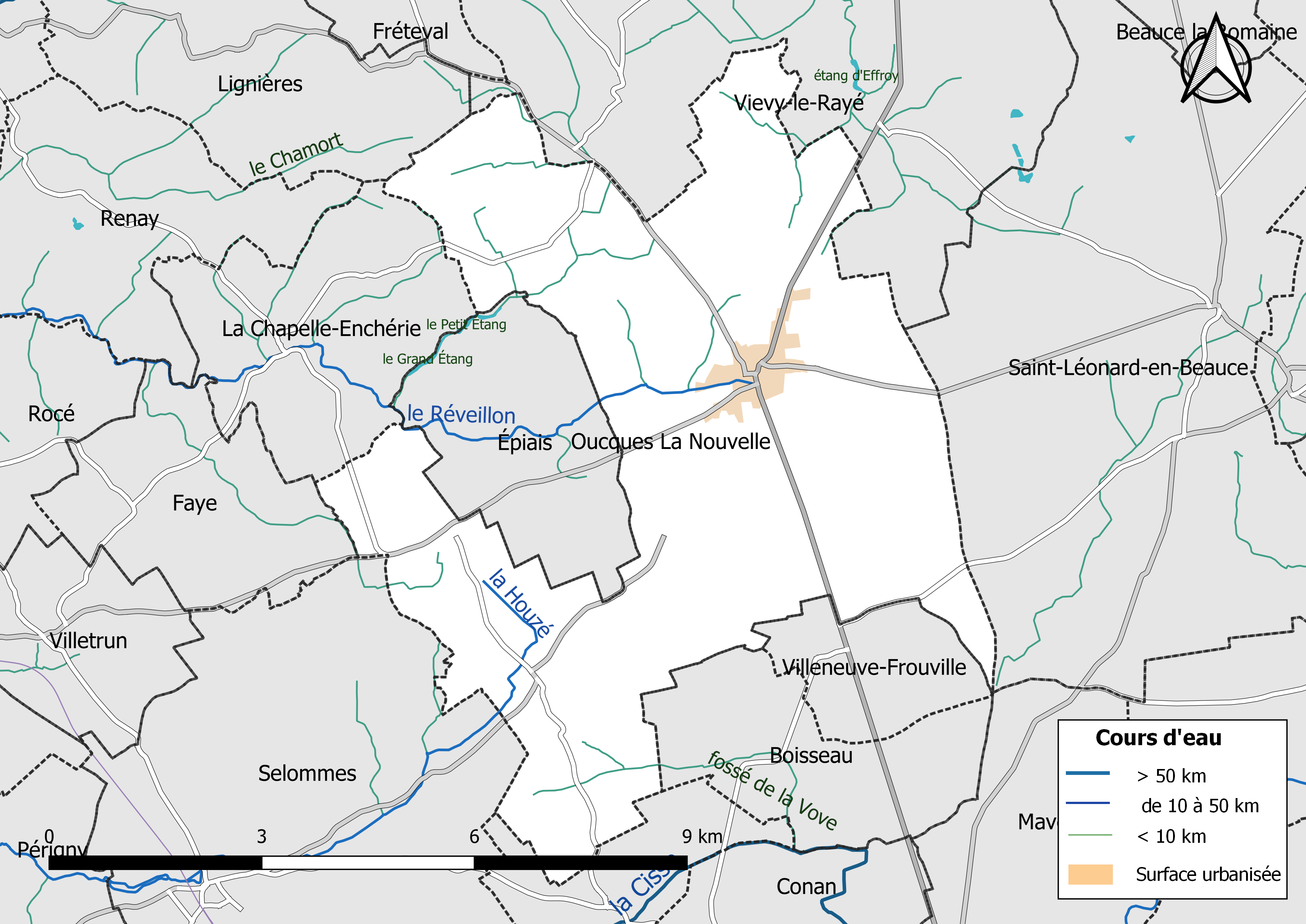 Carte du réseau hydrographique de la commune de Oucques La Nouvelle (Loir-et-Cher, France).